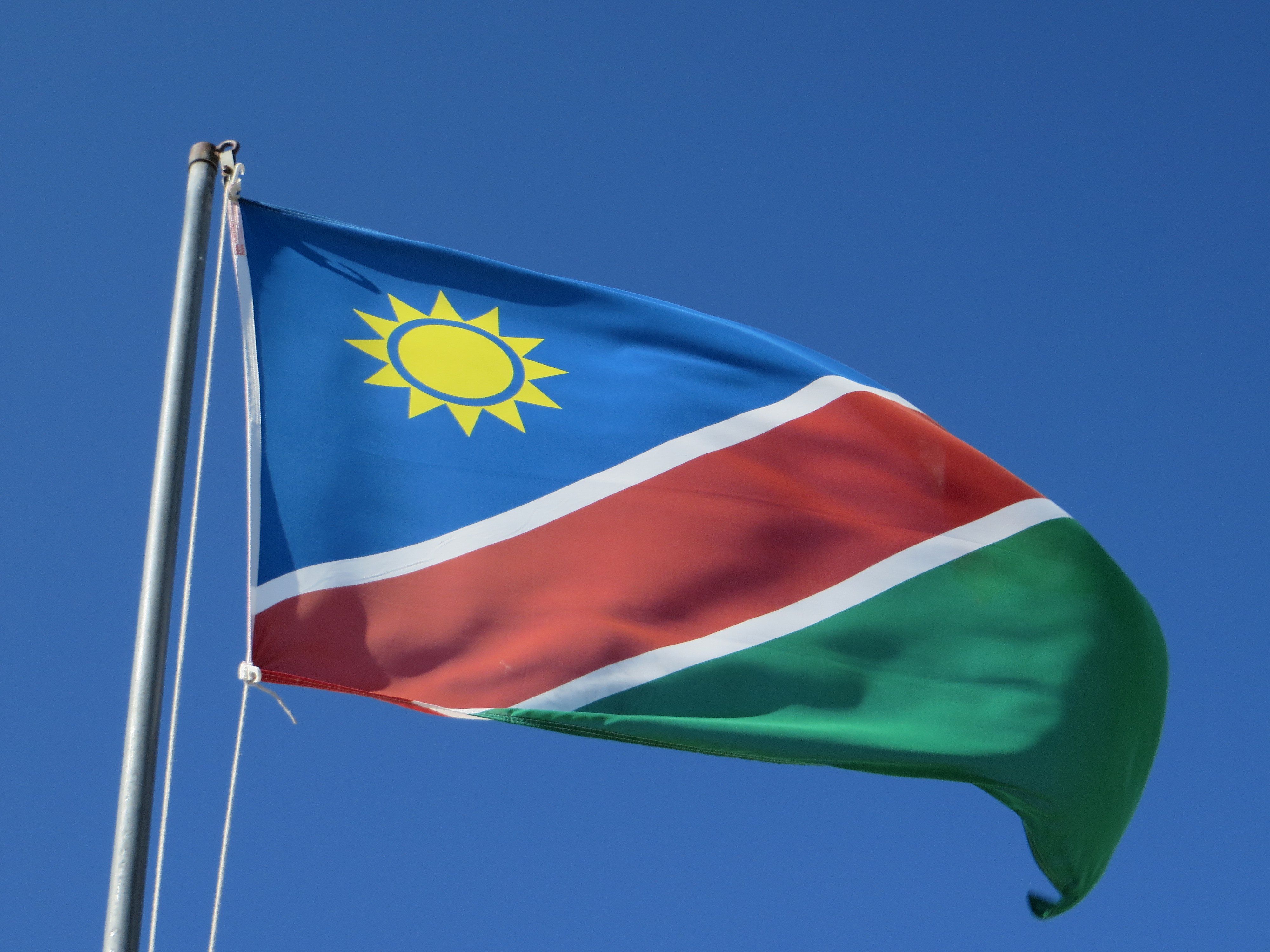 Vlag van Namibië